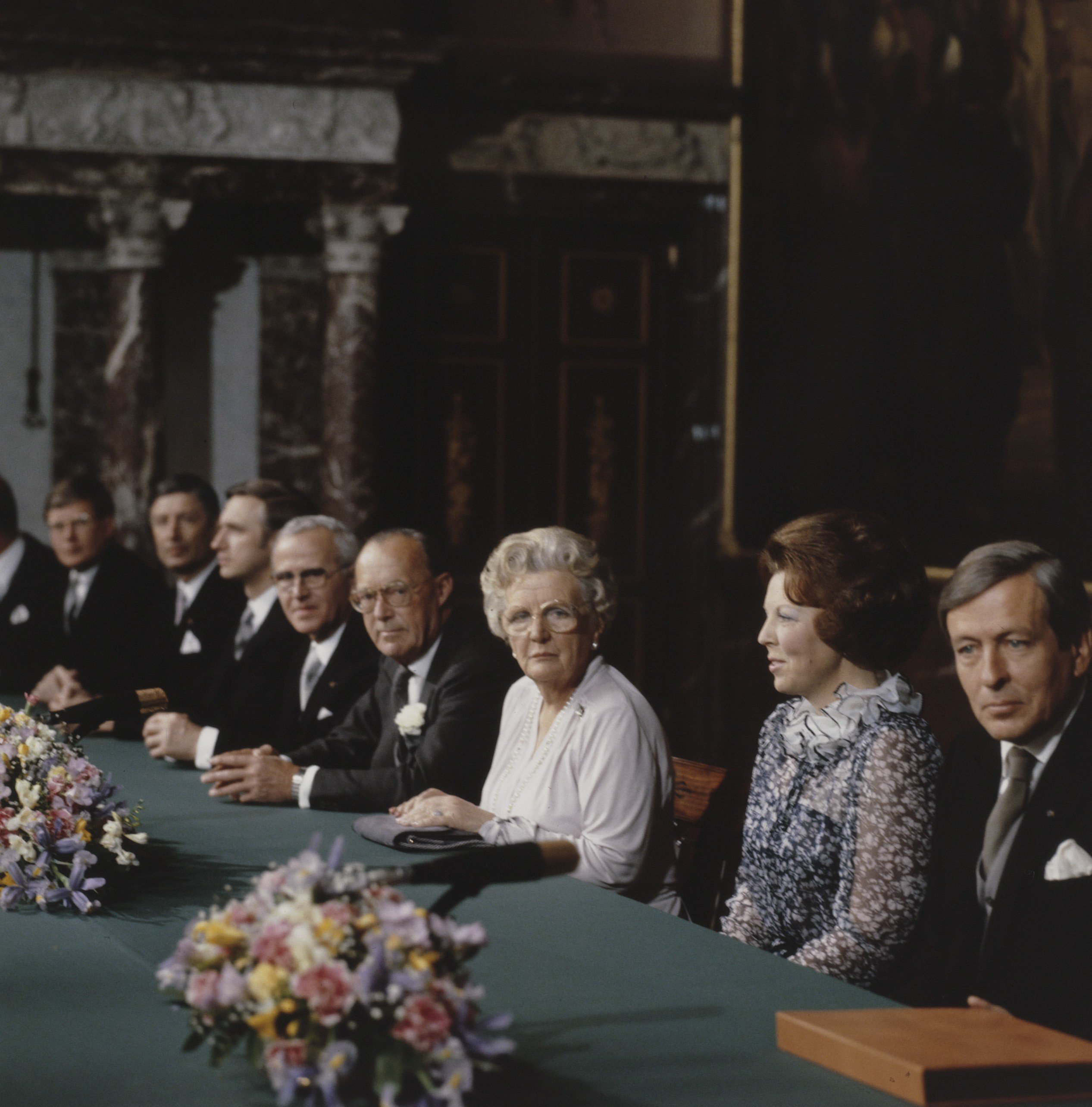 Collectie / Archief : Fotocollectie Anefo Reportage / Serie : [ onbekend ] Beschrijving : Troonswisseling 30 april : bijeenkomst voor de abdicatie het Paleis op de Dam ; Claus , Koningin Beatrix , Prinses Juliana en Prins Bernhard Datum : 30 april 1980 Trefwoorden : Troonswisselingen, bijeenkomsten Persoonsnaam : Beatrix, koningin, Bernhard, prins, Claus, prins Fotograaf : Croes, Rob C. / Anefo Auteursrechthebbende : Nationaal Archief Materiaalsoort : Dia (kleur) Nummer archiefinventaris : bekijk toegang 2.24.01.07 Bestanddeelnummer : 253-8181